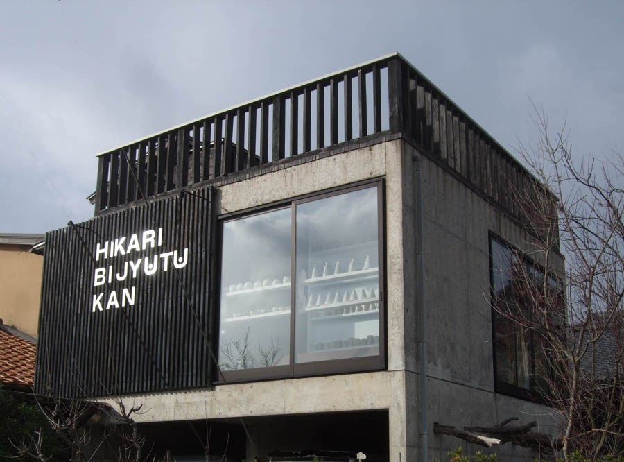 京丹後市網野町浜詰にある美術館